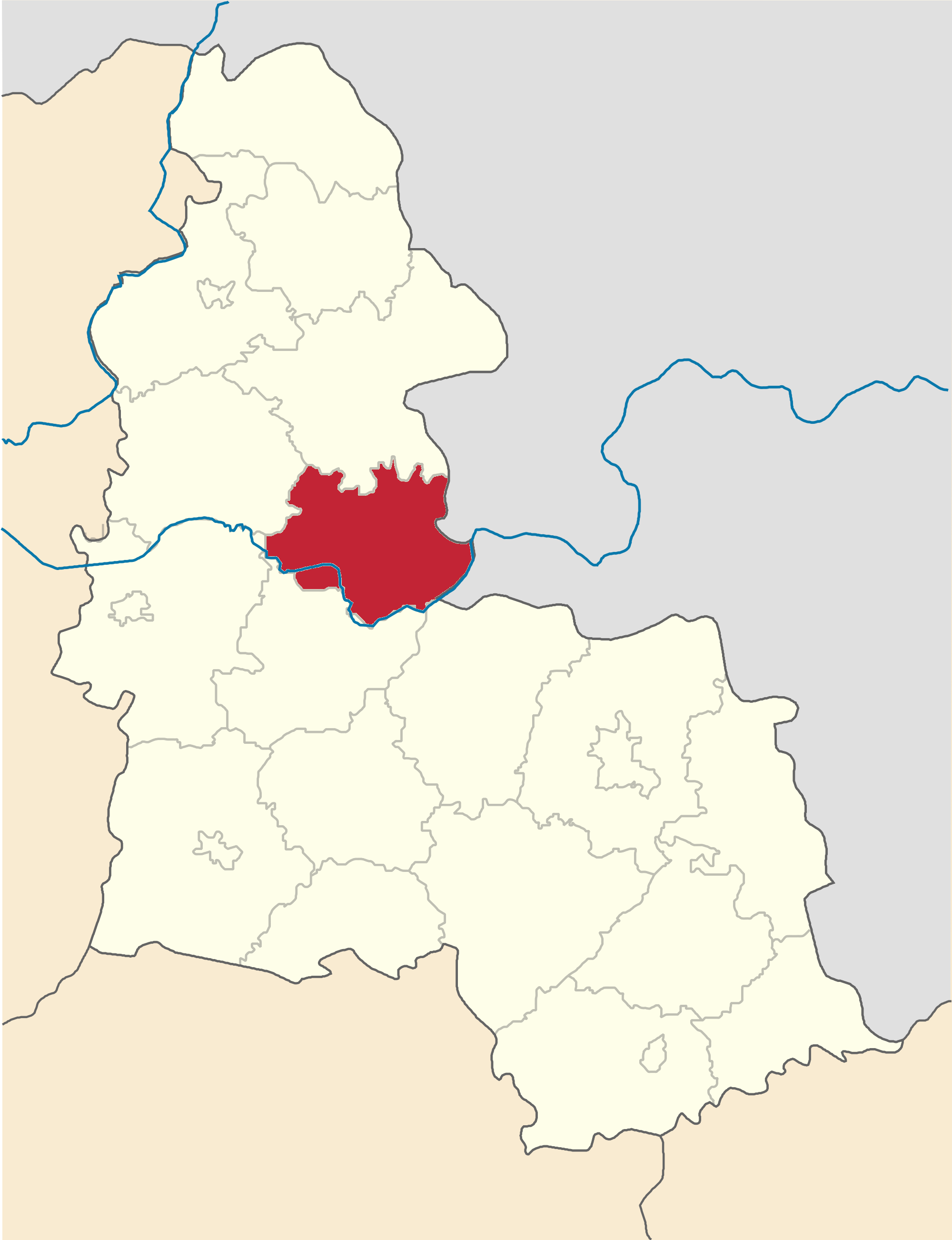 Putyvlskyi-Raion map